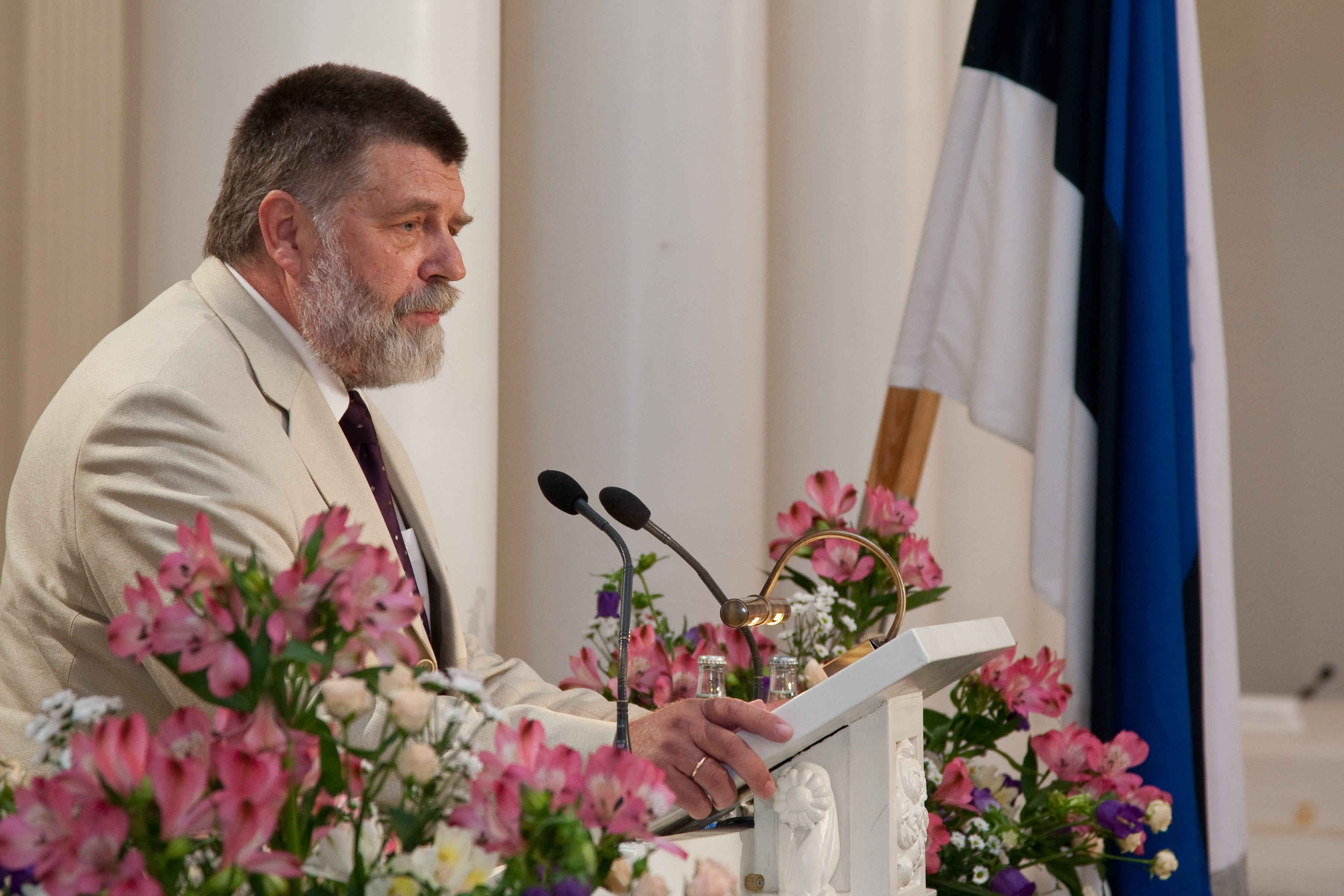 Matemaatika-informaatikateaduskonna dekaan professor Mati Kilp Tartu Ülikooli REALIA ET NATURALIA valdkondlikkul magistriõppe lõpuaktusel TÜ aulas 16. juunil 2010.